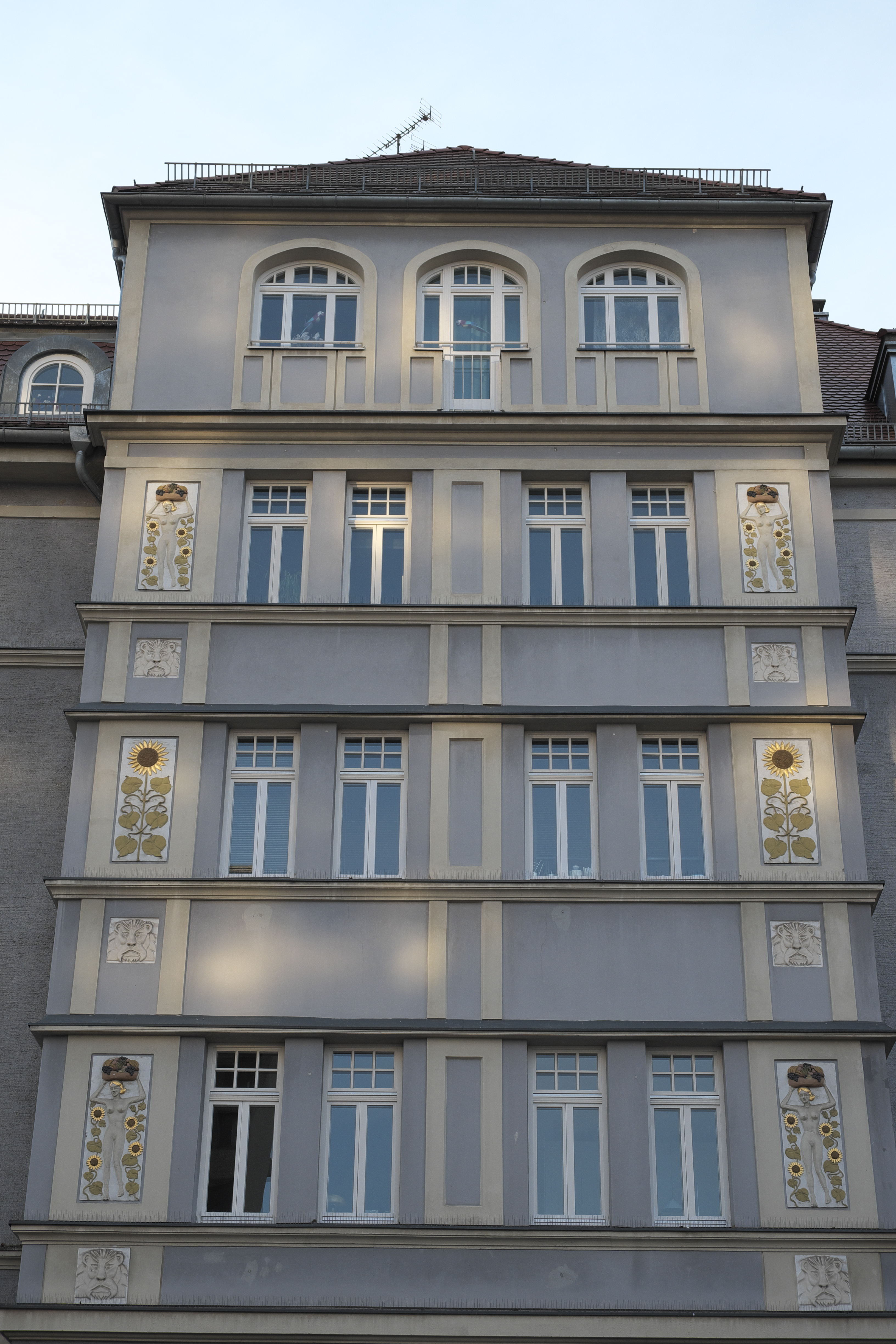 Mietshaus im Jugendstil in der Andréestraße 2 in Neuhausen im Stadtbezirk Neuhausen-Nymphenburg in München (Bayern/Deutschland)